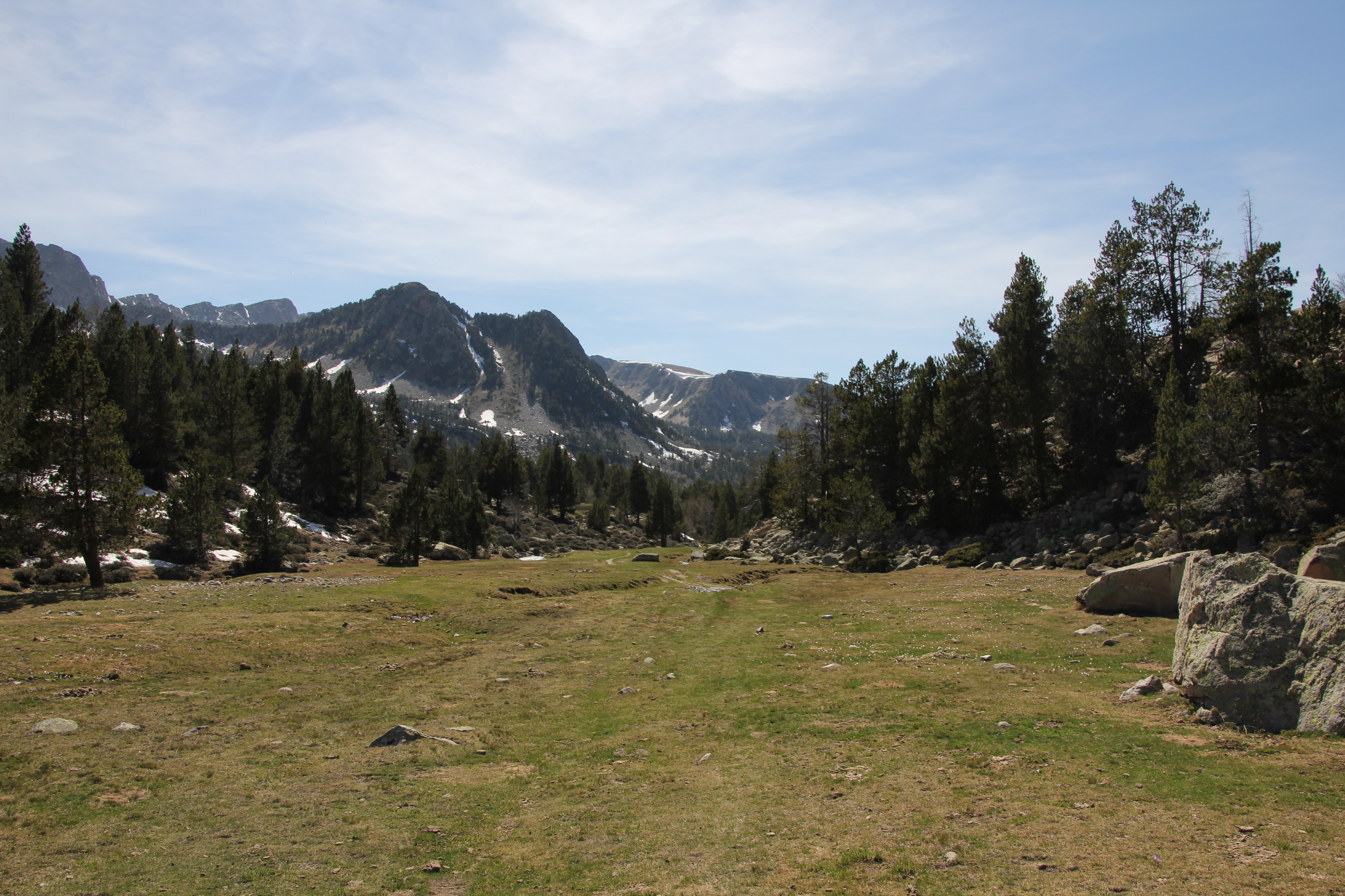 Vall del Madriu-Perafita-Claror This is a a photo of a natural area in Andorra with id: AD-VMPC